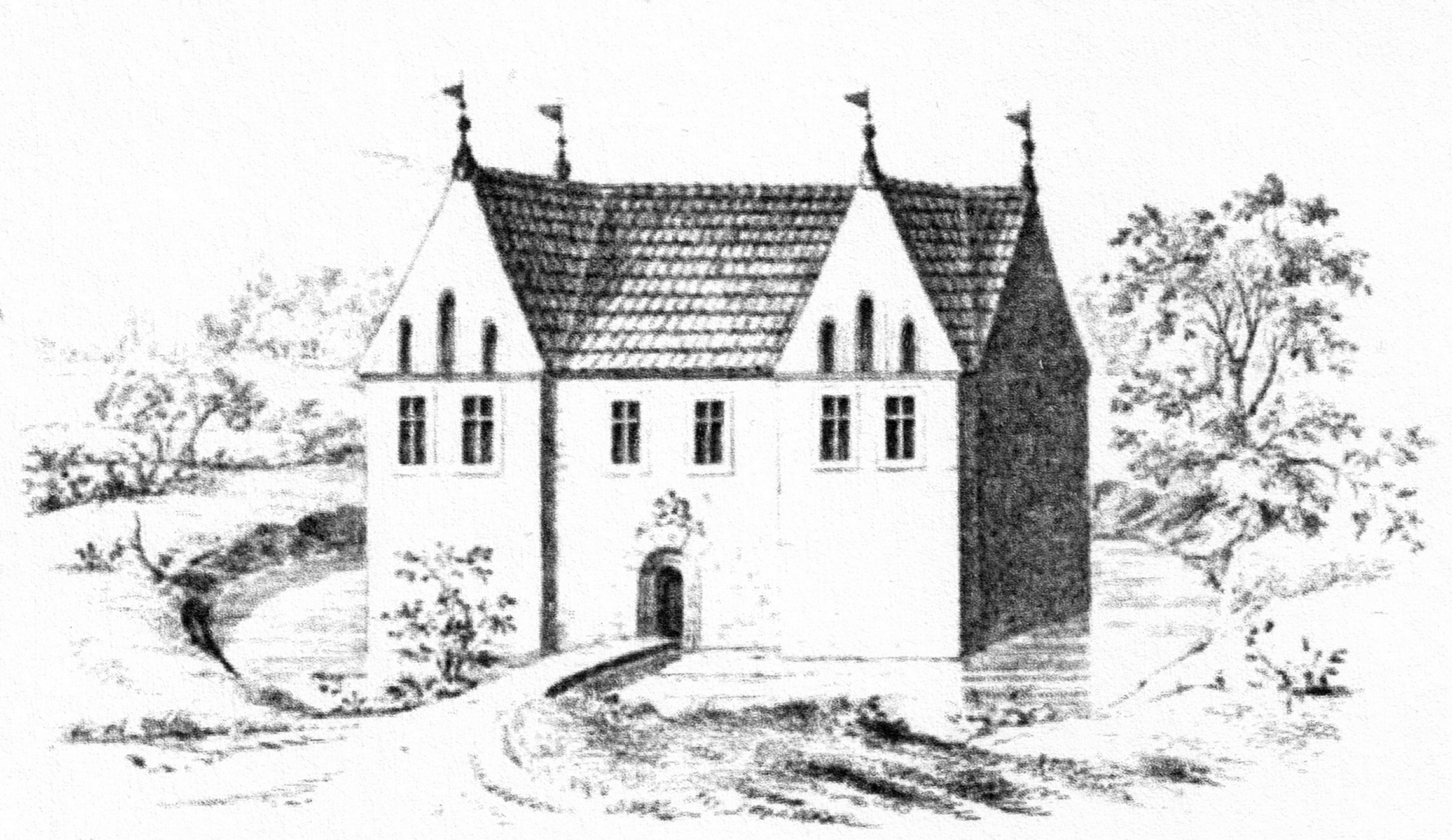 Das alte Herrenhaus Tüschenbek um 1563, Zeichnung von Köhler und Roisternitz 1862